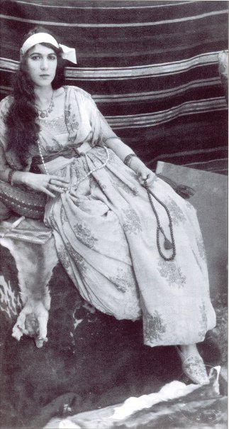 Photo de l'actrice Haydée Tamzali.